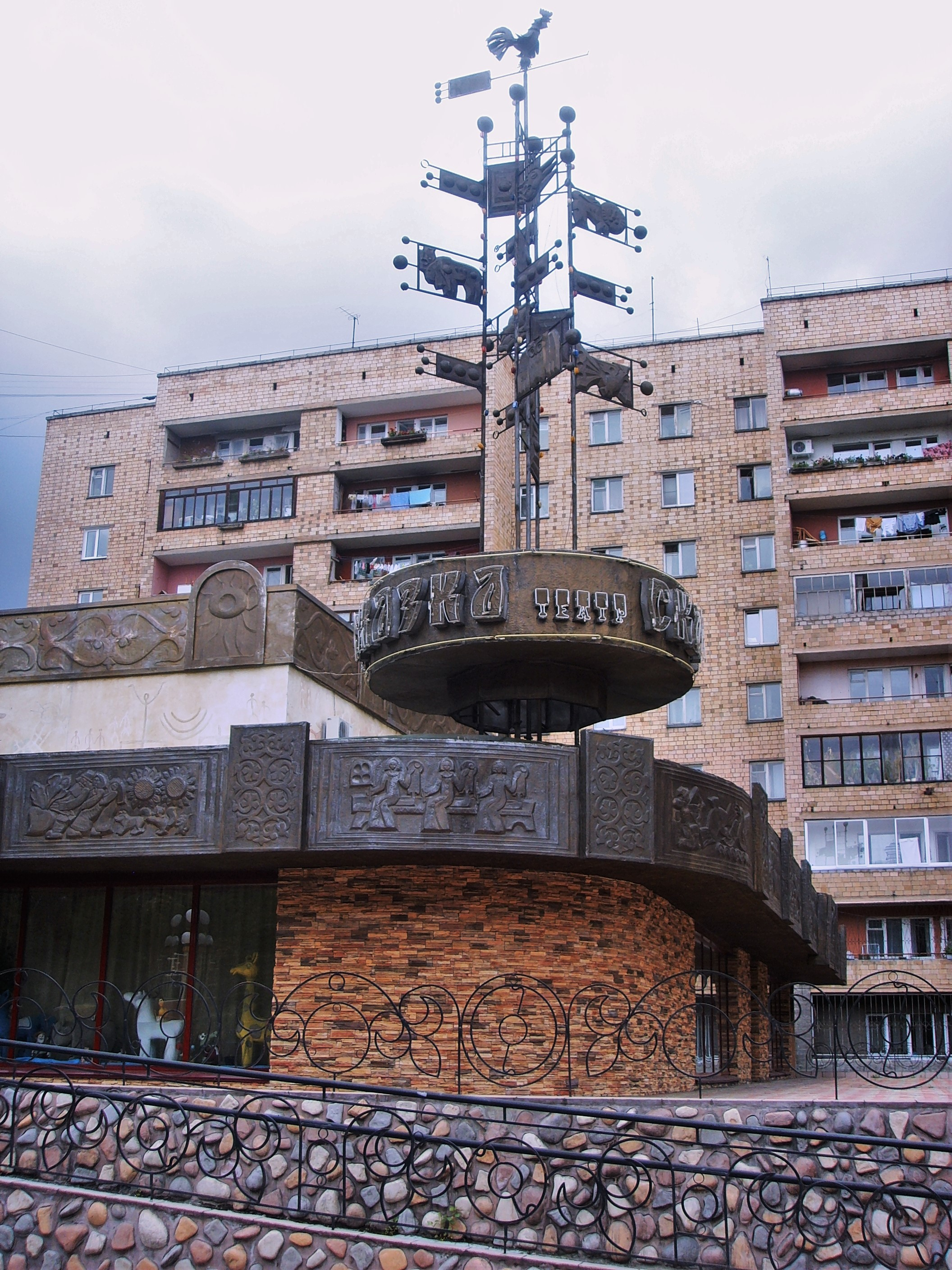 фото здания театра "Сказка"